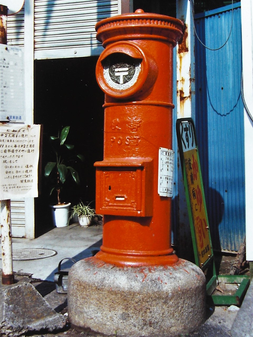 戦前製の標準的な丸形庇付ポスト 茨城県つくば市